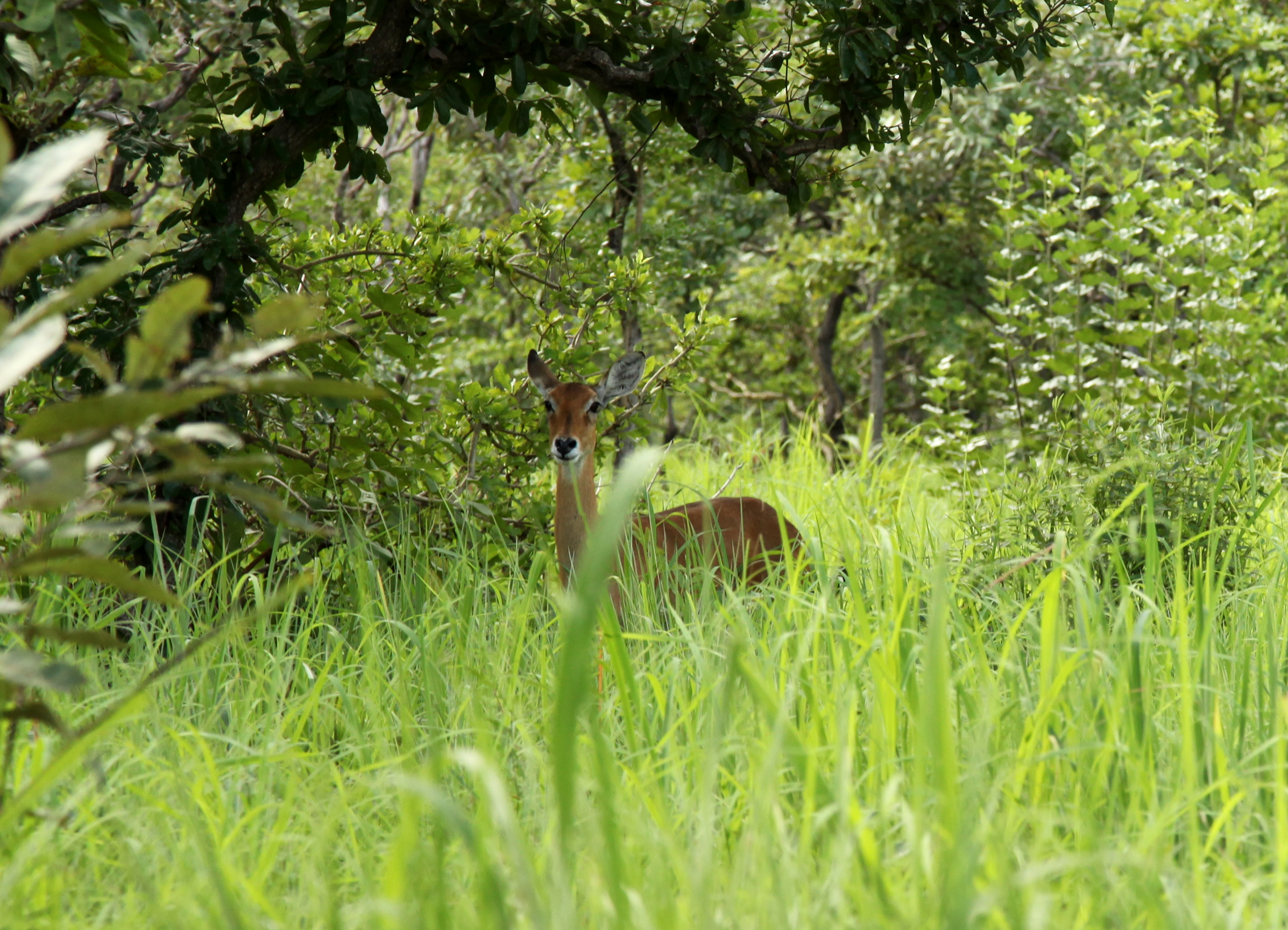 A kob in Kainji National Park, Nigeria